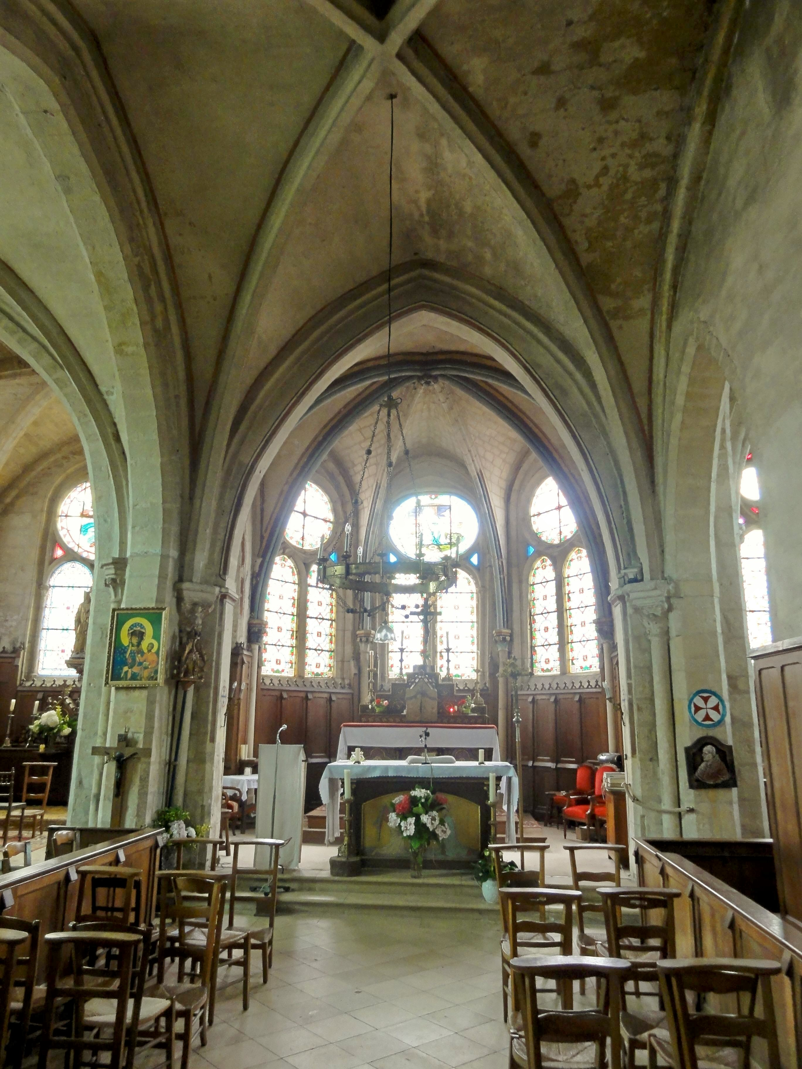 Abside.